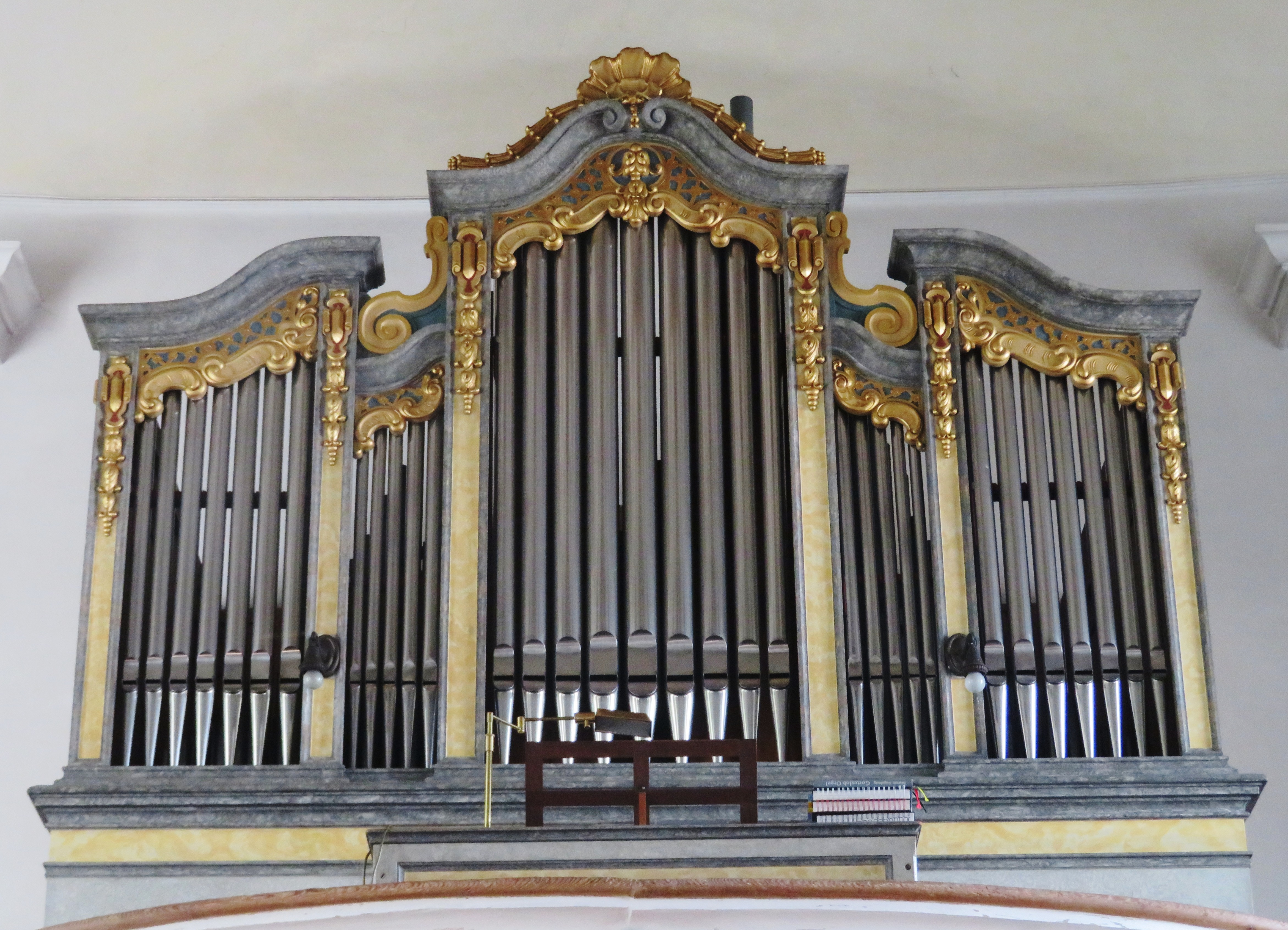 Siemann-Orgel kath. Pfarrkirche St. Johann Baptist Nersingen-Straß (1901)